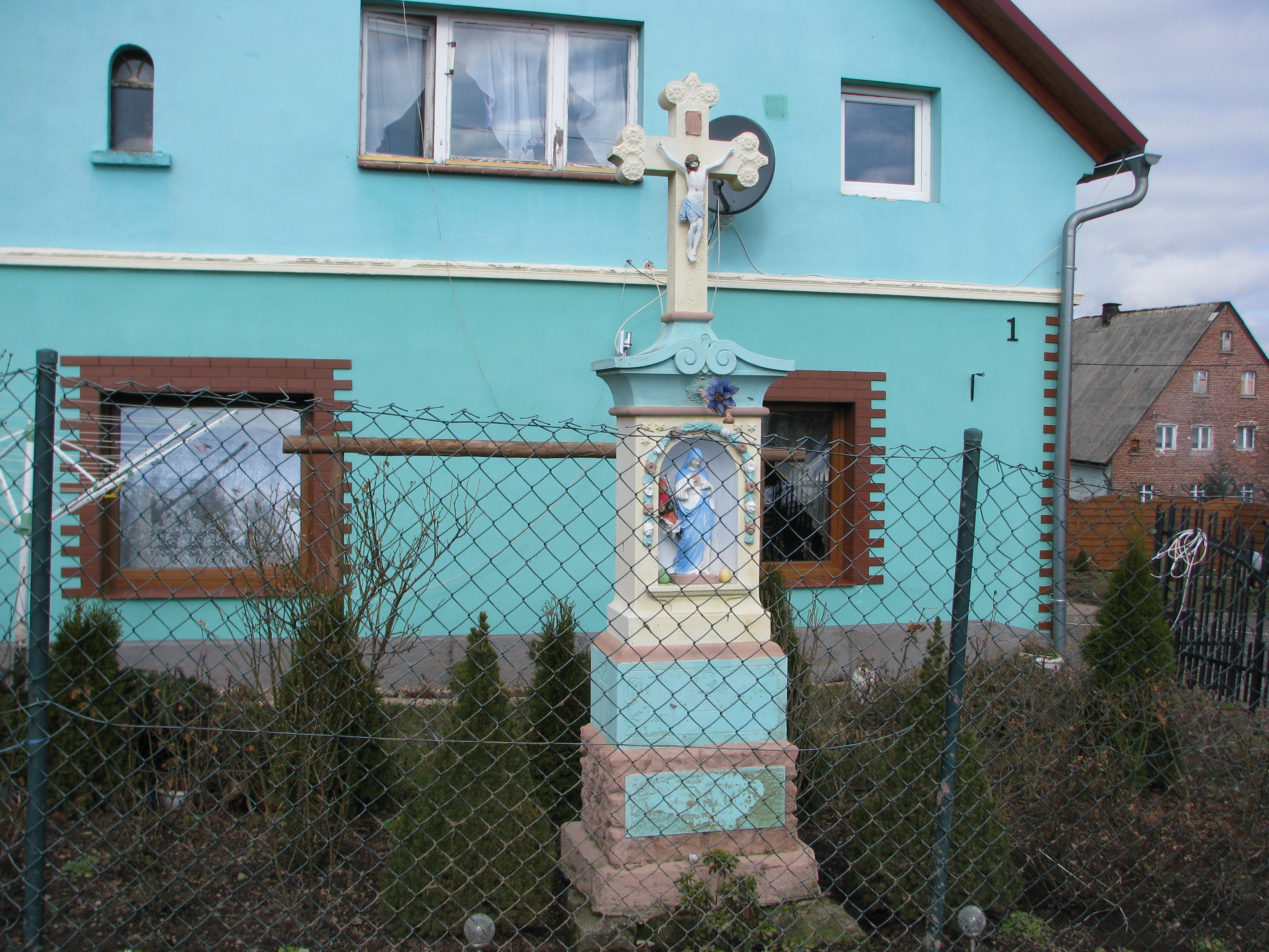 Kapliczka